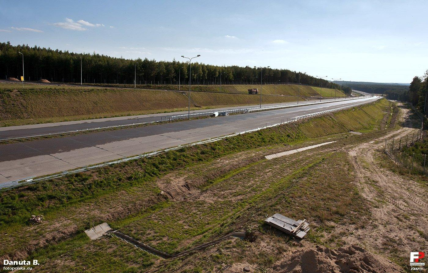 Autostrada A2, widok na zachód, od skrzyżowania autostrady z realizowaną równolegle drogą ekspresową S3, która zastąpi wysłużoną drogę krajową nr 3. To jeszcze plac budowy, ciężarówka to obsługa budowy. Ruch tu kiedyś będzie jak w Rzymie. Zrobimy kiedyś fotkę w godzinie szczytu.